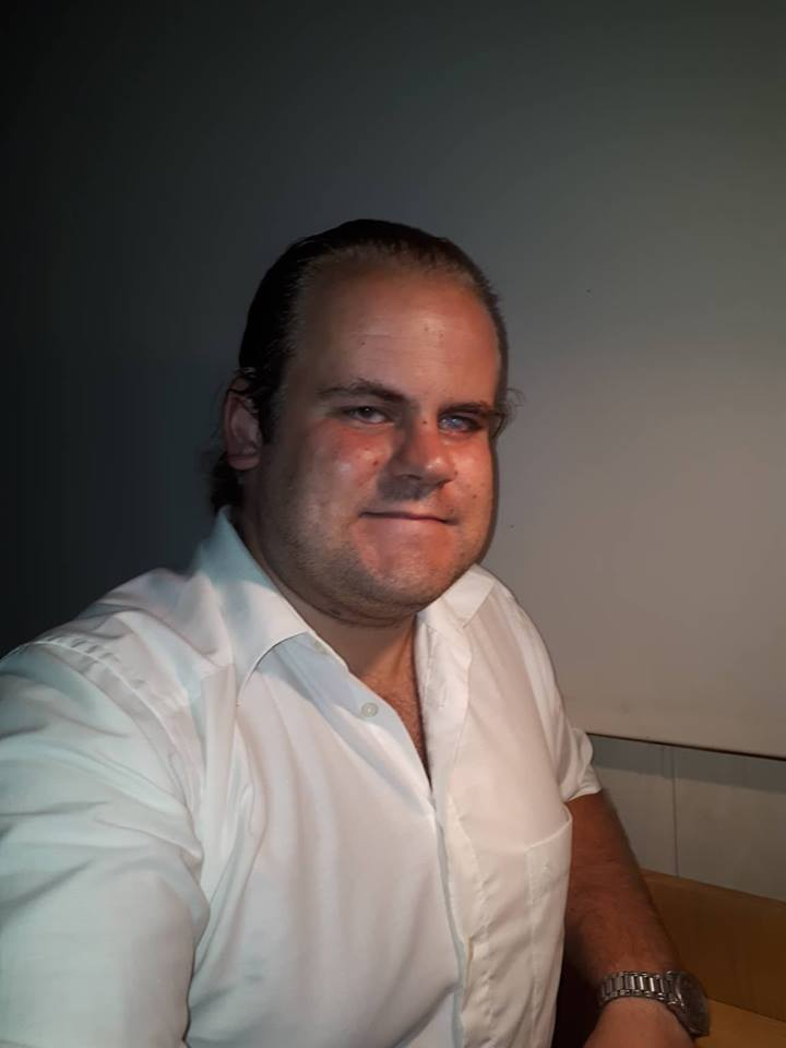 foto Annes Meister aasta 2018